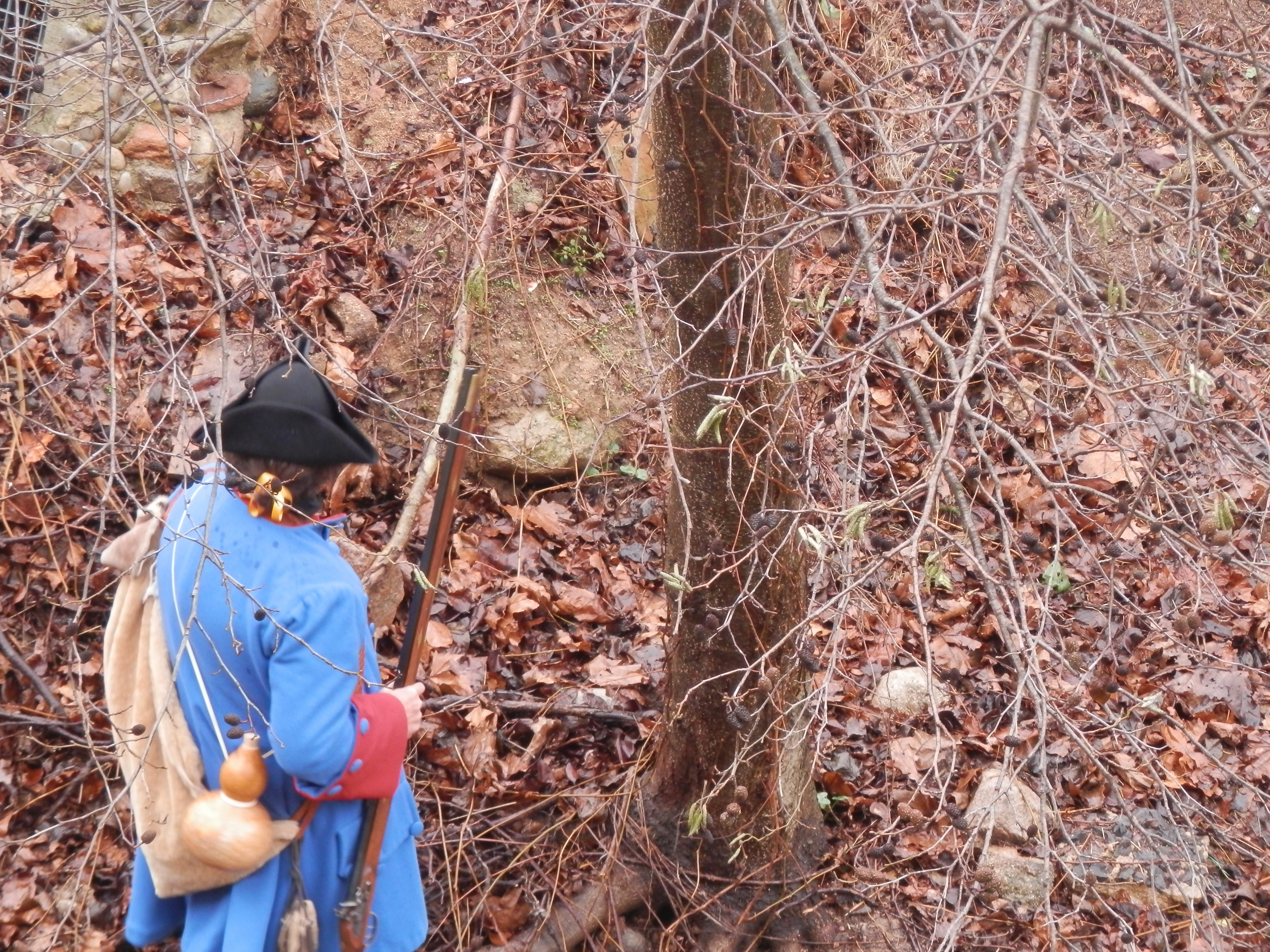 Fotografia de la recreació del Combat d'Arbúcies de 2014.